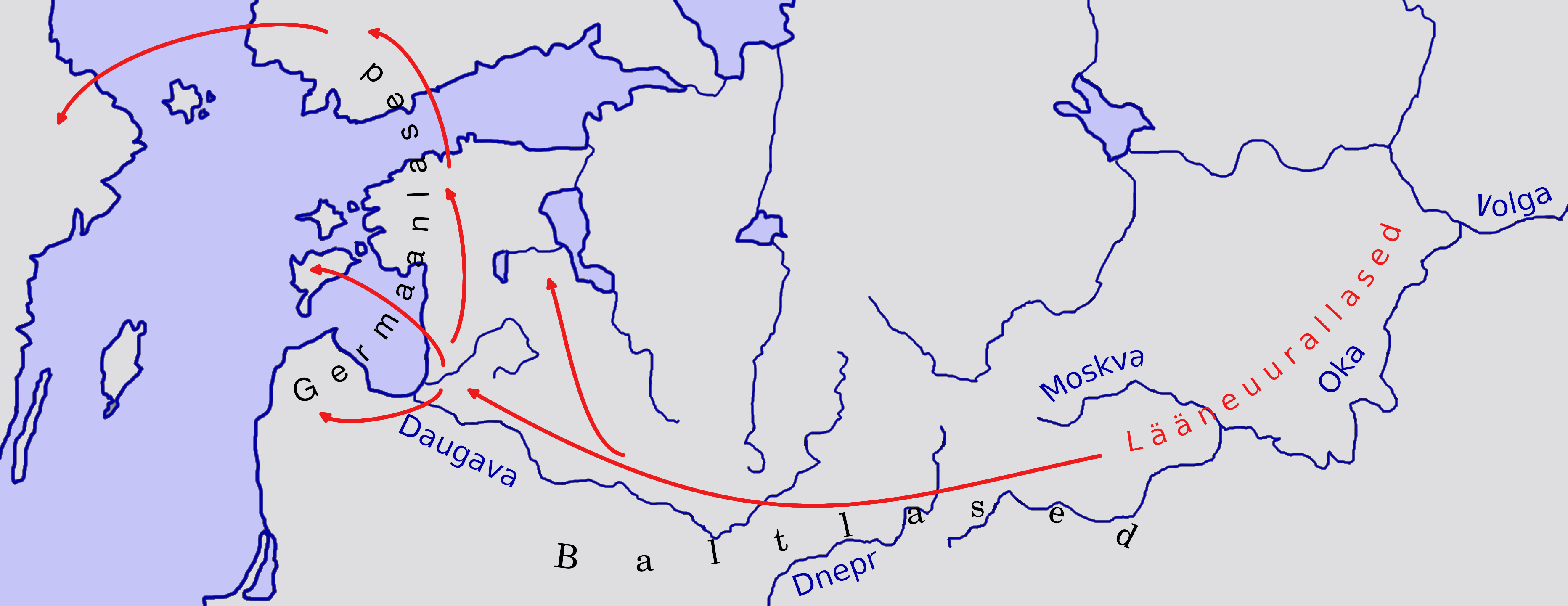 Läänemeresoome algkeele varaste vormide levik Valter Langi järgi ("Läänemeresoome tulemised", 2018)